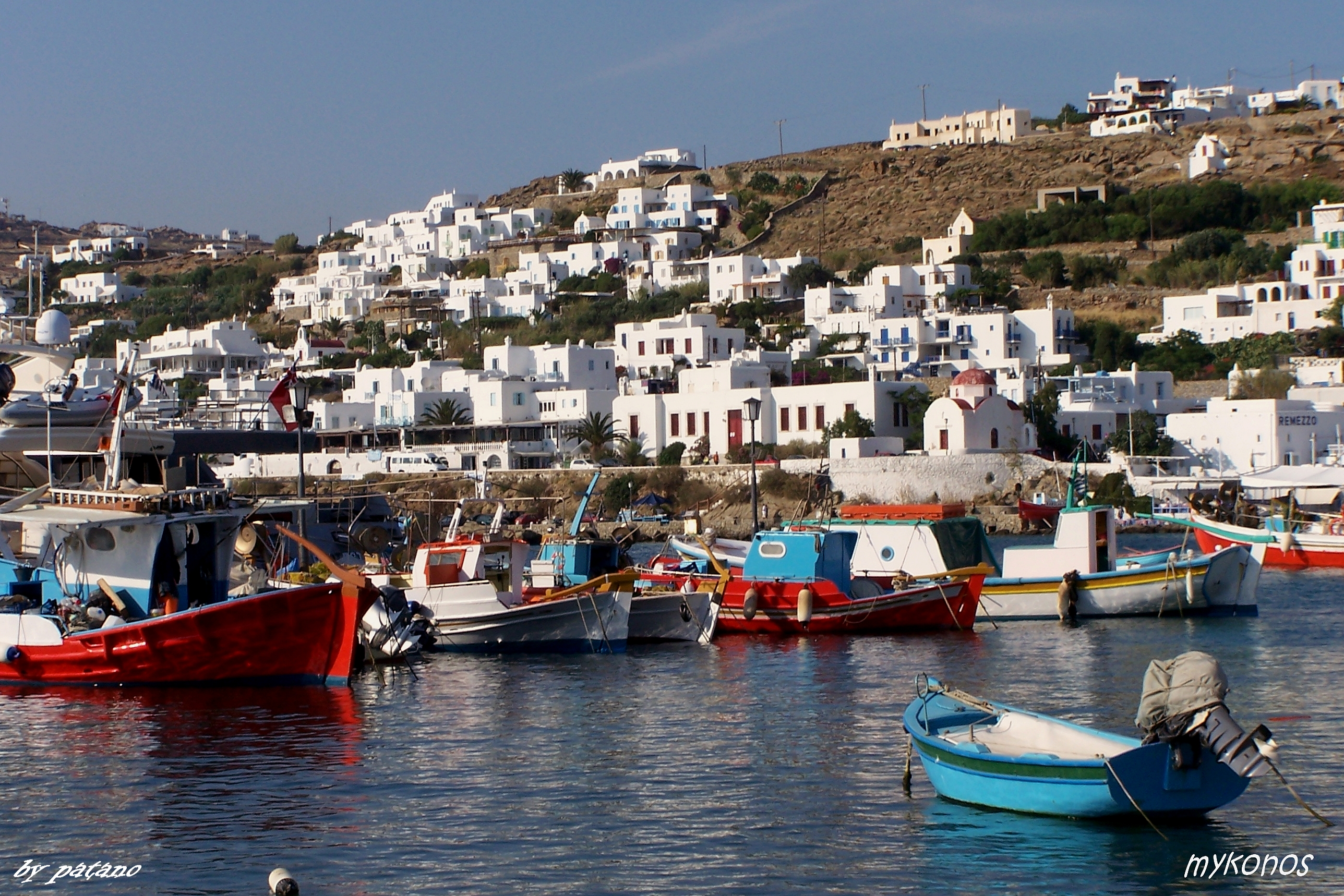 mykonos